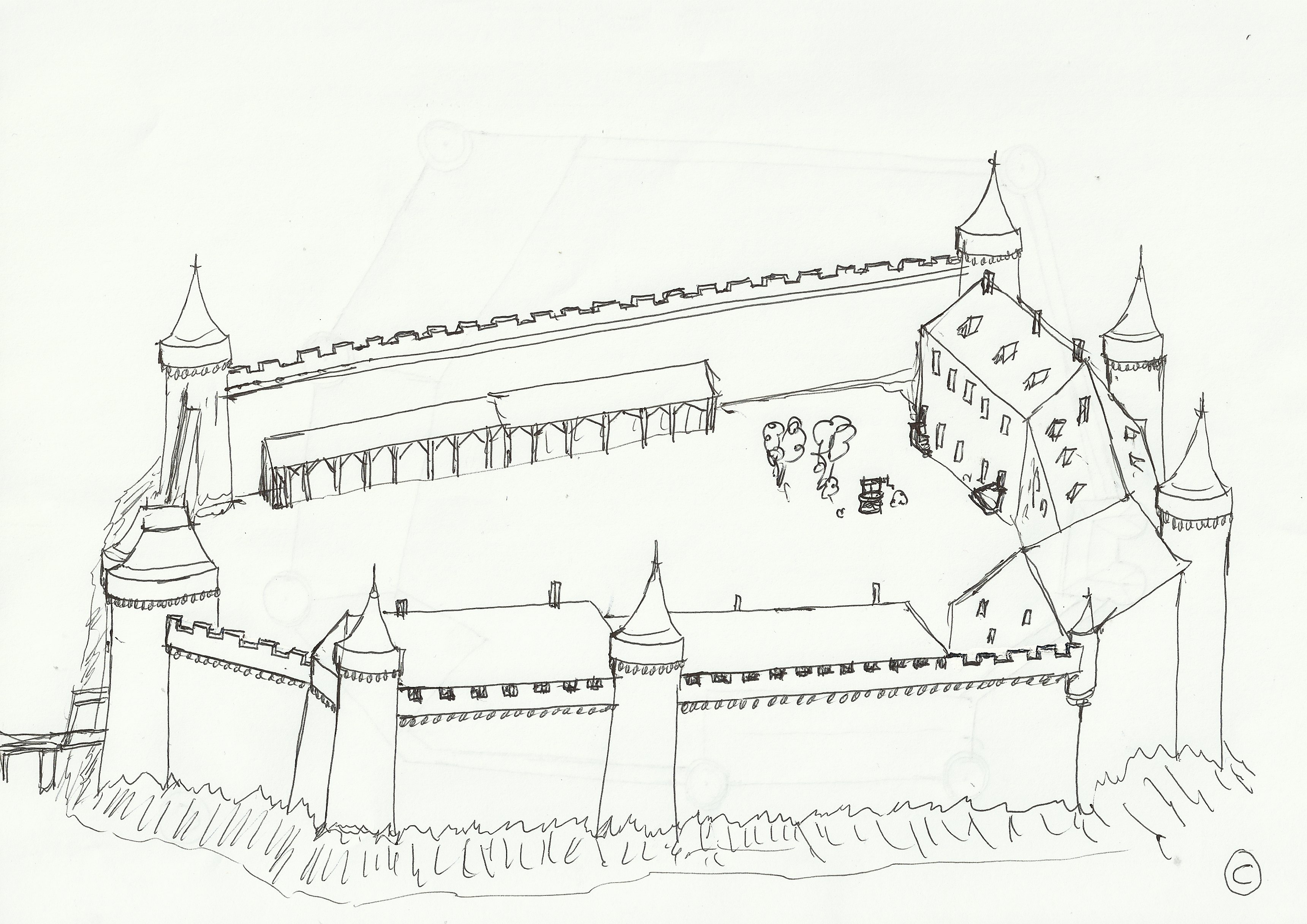 Croquis restituant le château seigneurial de la Garnache vers le XIIIe-XIVe siècle tel qu'il aurait pu être.